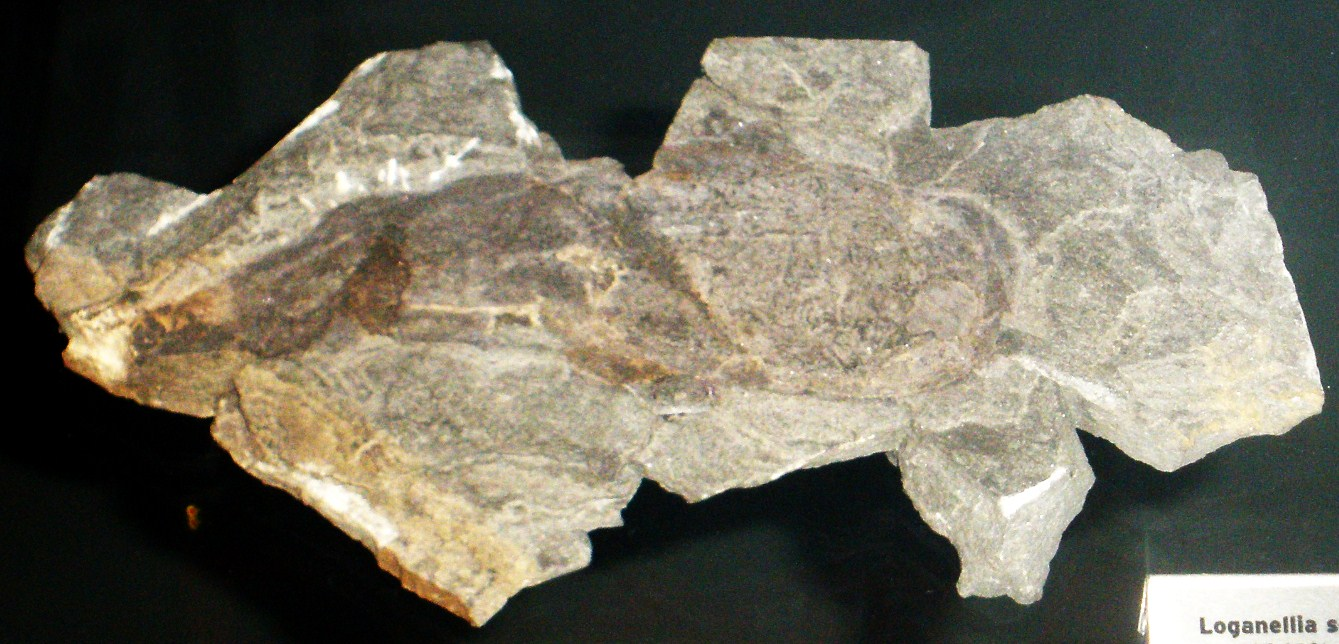 Fossil of Loganellia, an extinct fish (Thelodonti) from the Silurian Took the photo at Museon museum, Den Haag